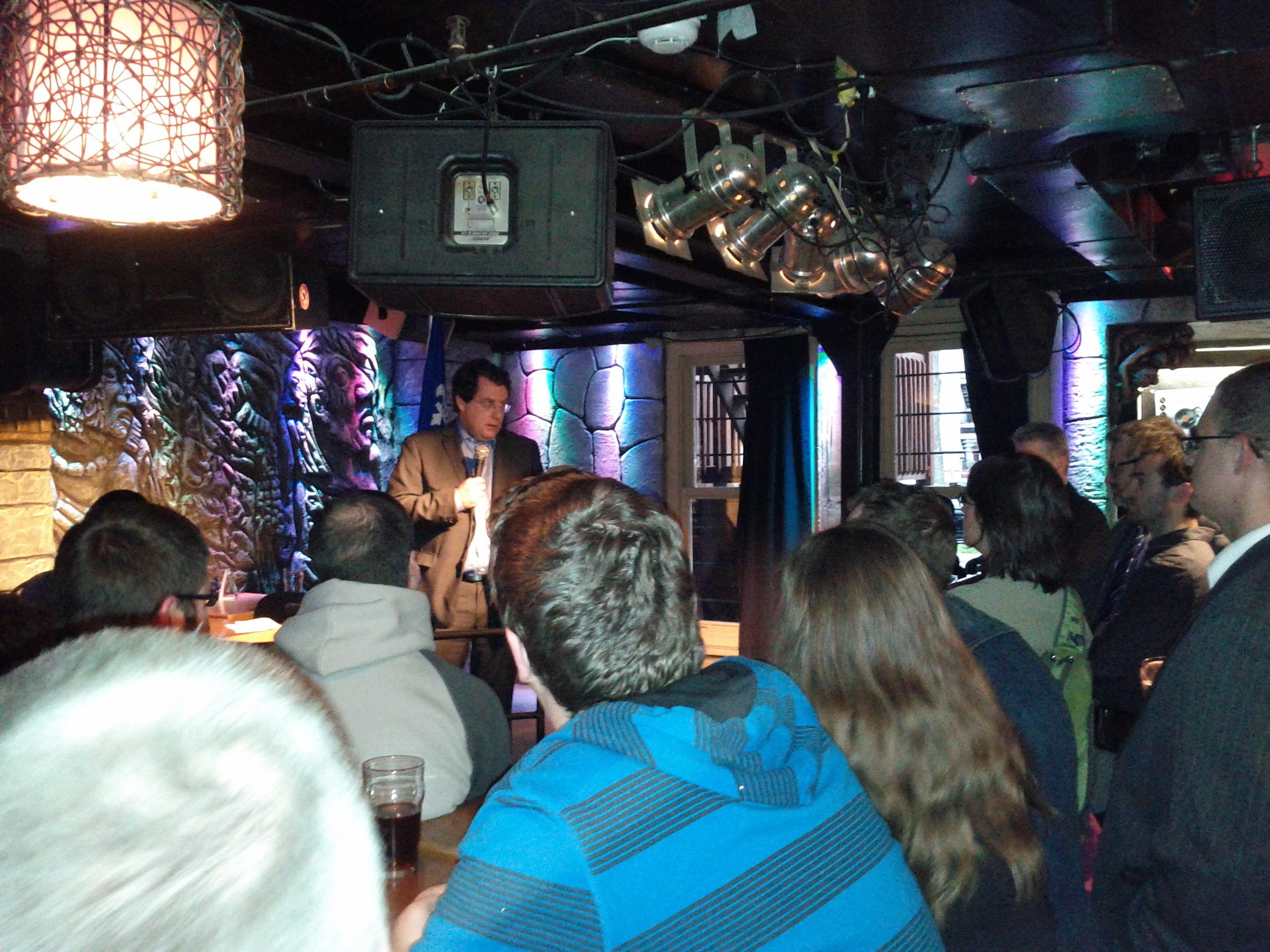 Le ministre québécois responsable des Institutions démocratiques et de la Participation citoyenne, Bernard Drainville, lors d'une rencontre avec des citoyens de Québec, le 15 mai 2013.